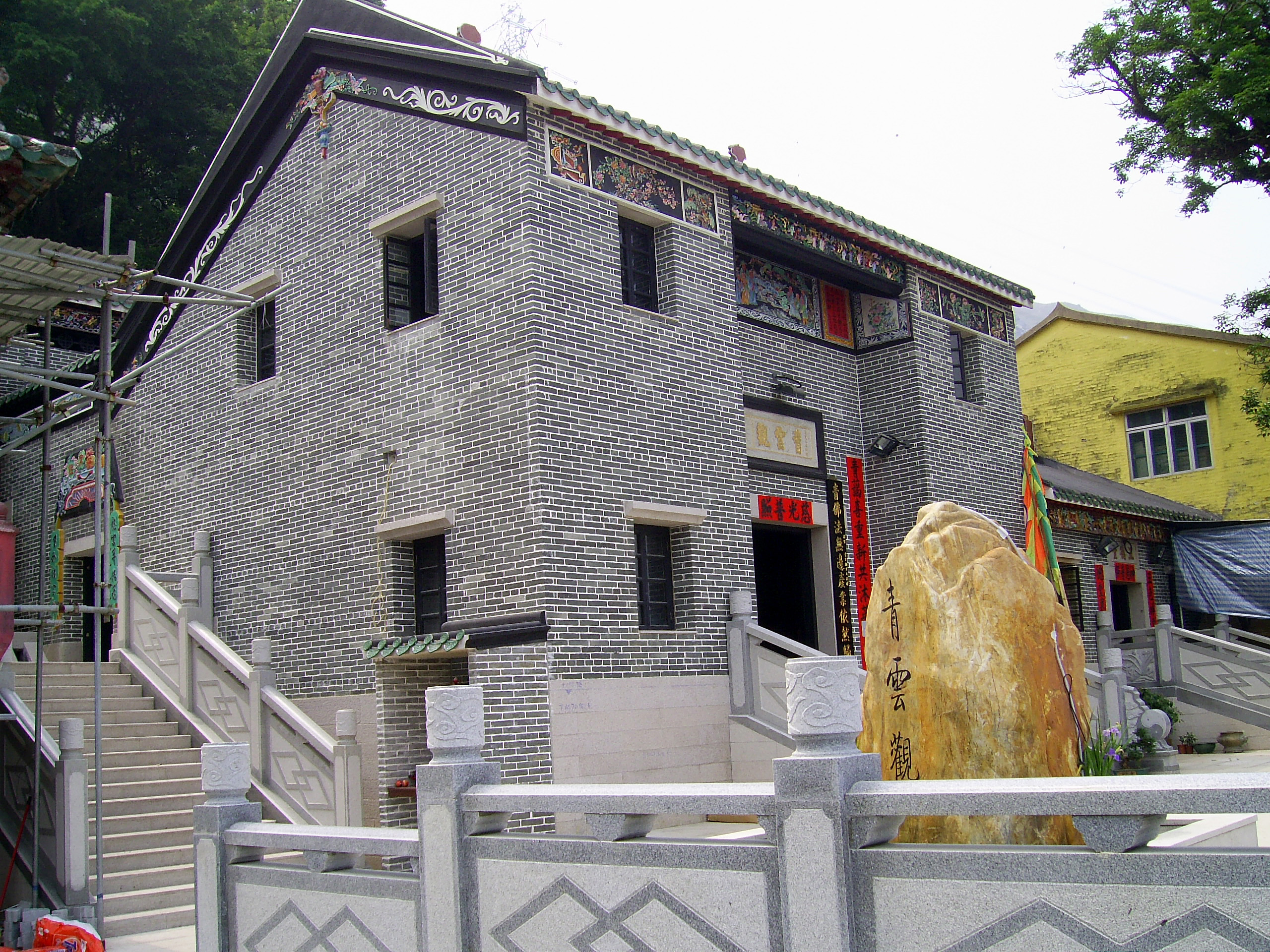 中文（香港）: 重建後的青雲觀外觀